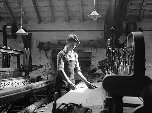 Teitl Cymraeg/Welsh title: Melin Wlân Penmachno Ffotograffydd/Photographer: Geoff Charles (1909-2002) Dyddiad/Date: April 25, 1952 Cyfrwng/Medium: Negydd ffilm / Film negative Cyfeiriad/Reference: (gch02741) Rhif cofnod / Record no.: 3368507 Rhagor o wybodaeth am gasgliad Geoff Charles yn Llyfrgell Genedlaethol Cymru More information about the Geoff Charles Collection at the National Library of Wales